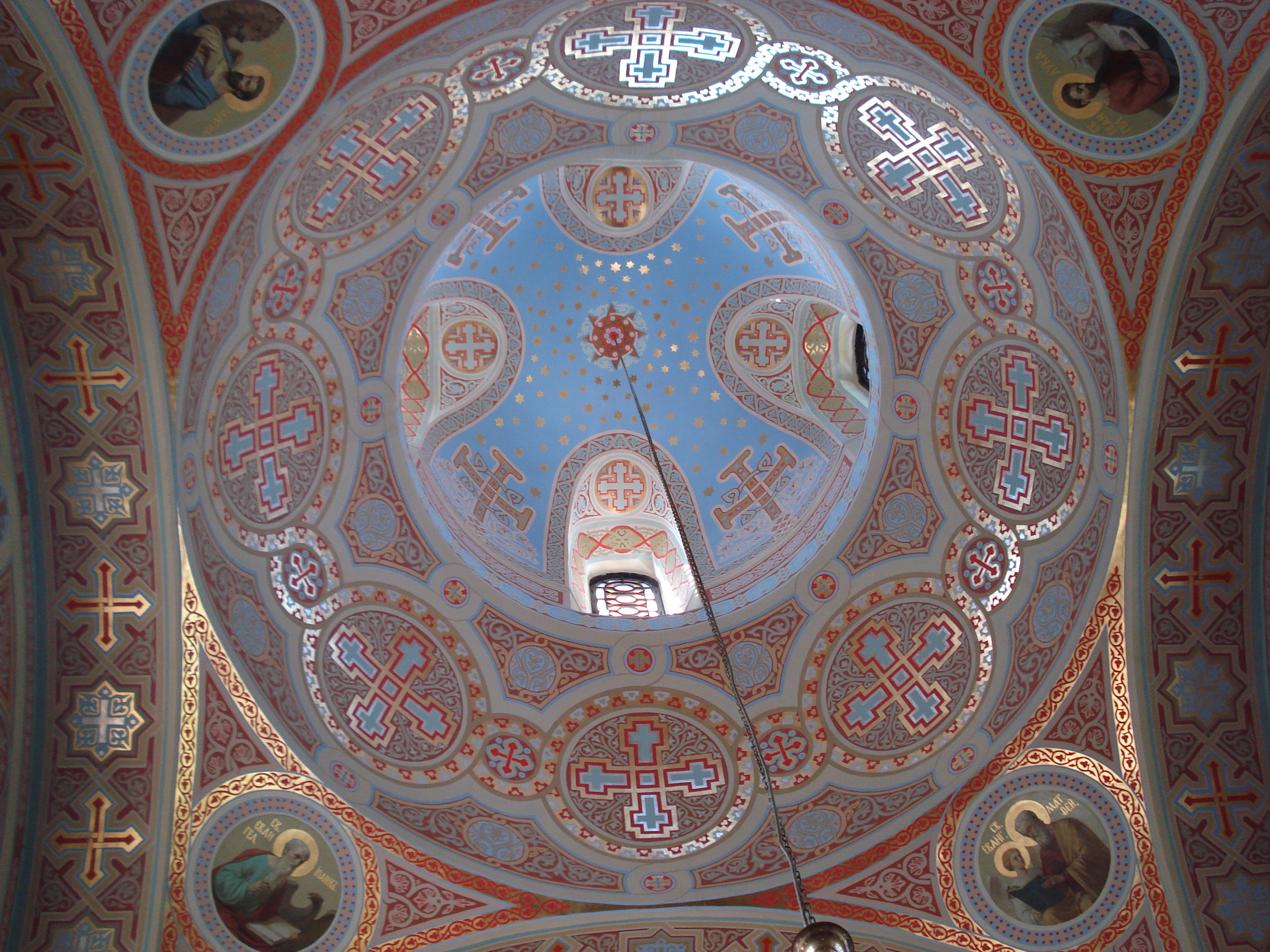 Роспись купола Форосской церкви.